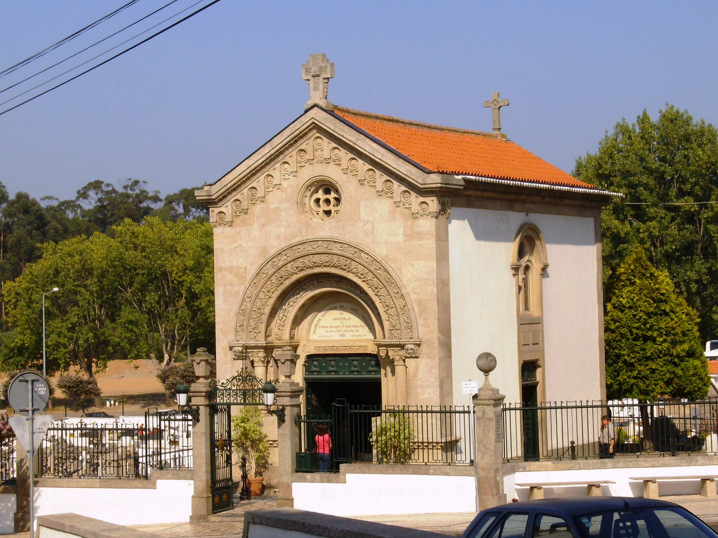 Capela-jazigo de D. Maria Adelaide de Sam José e Sousa, também referida como Santa Maria Adelaide e Santinha de Arcozelo, Arcozelo, Vila Nova de Gaia, distrito do Porto, Portugal.